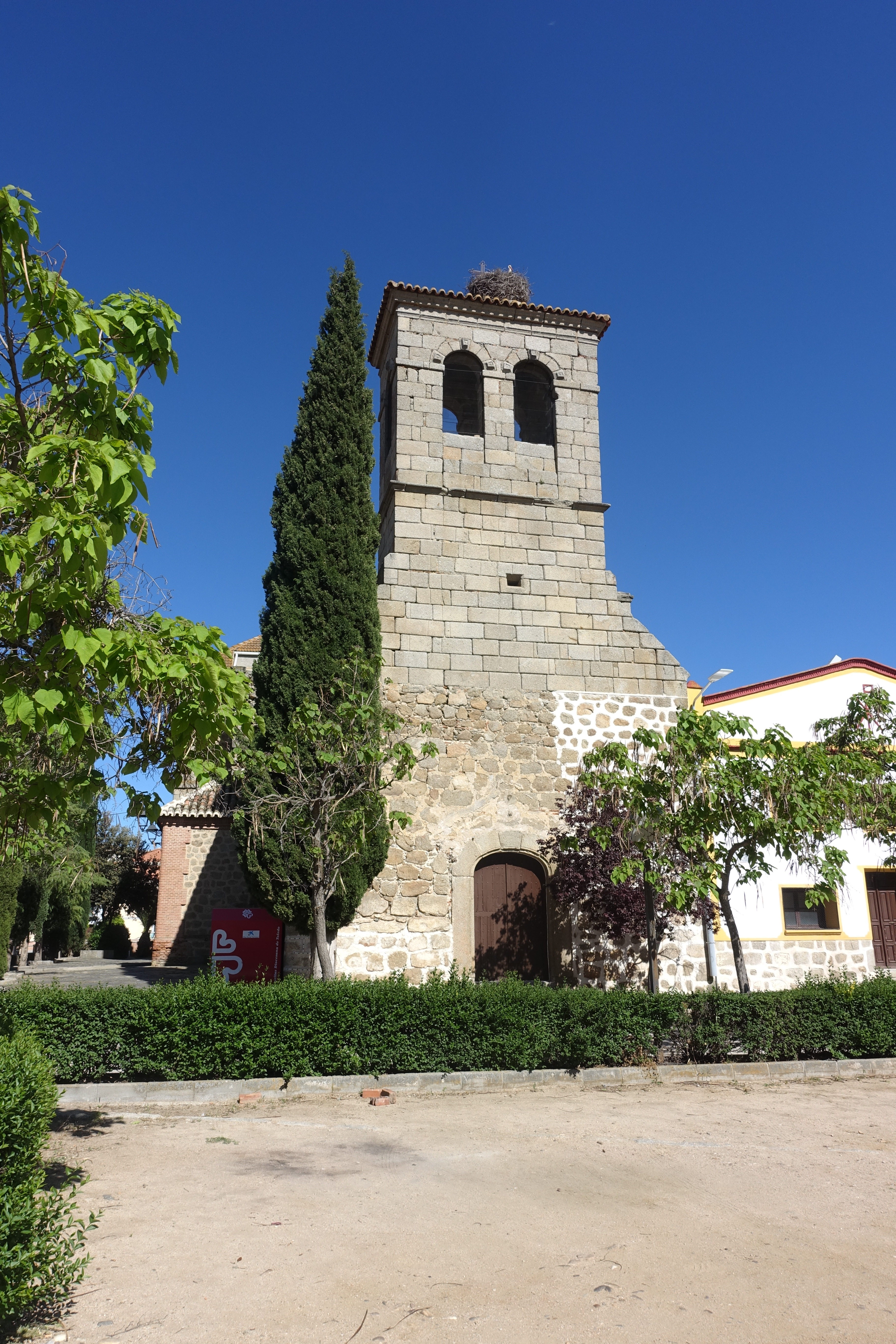 Iglesia de San Andrés Apóstol, San Martín de Montalbán (Toledo, España).